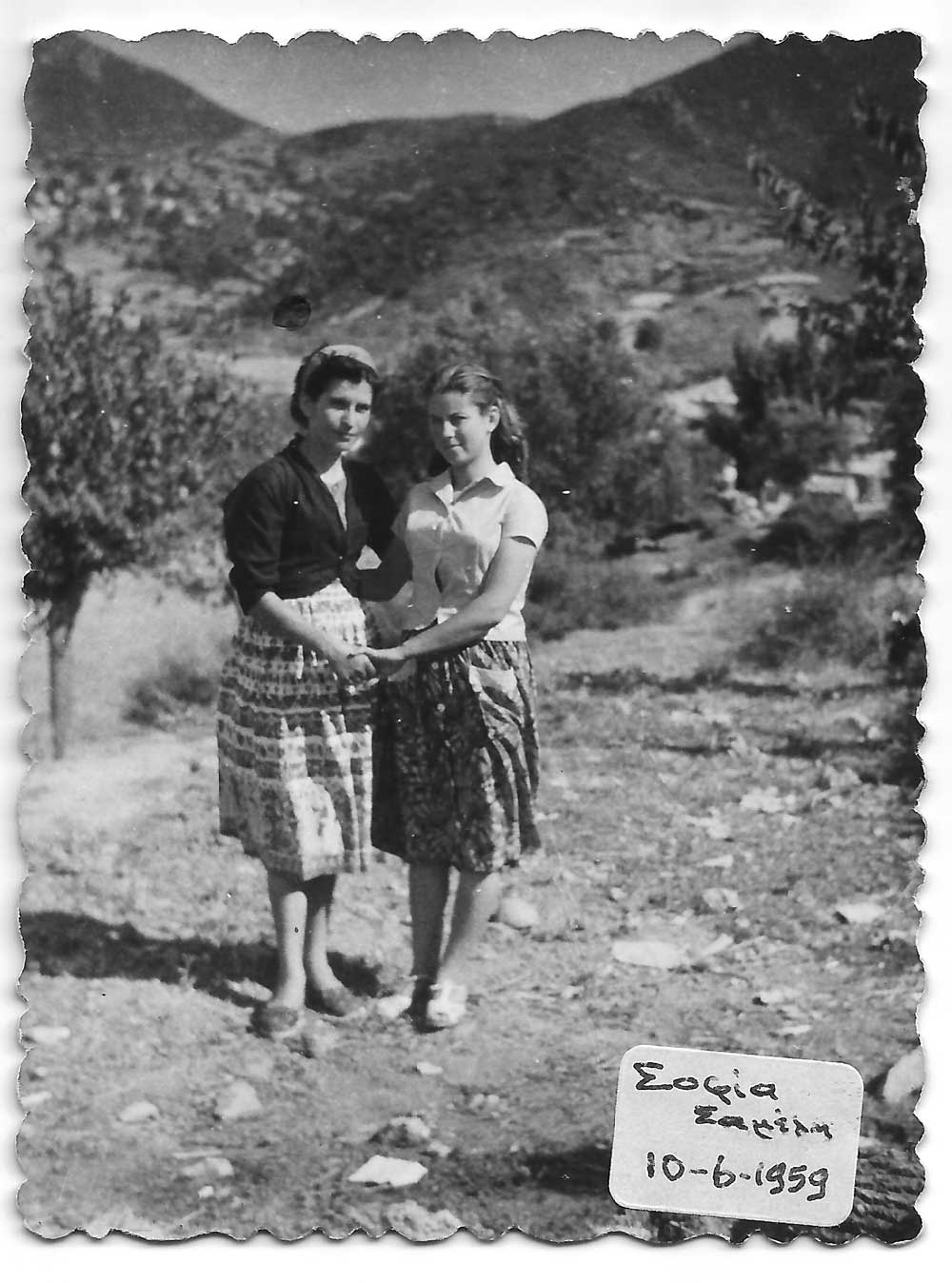 a